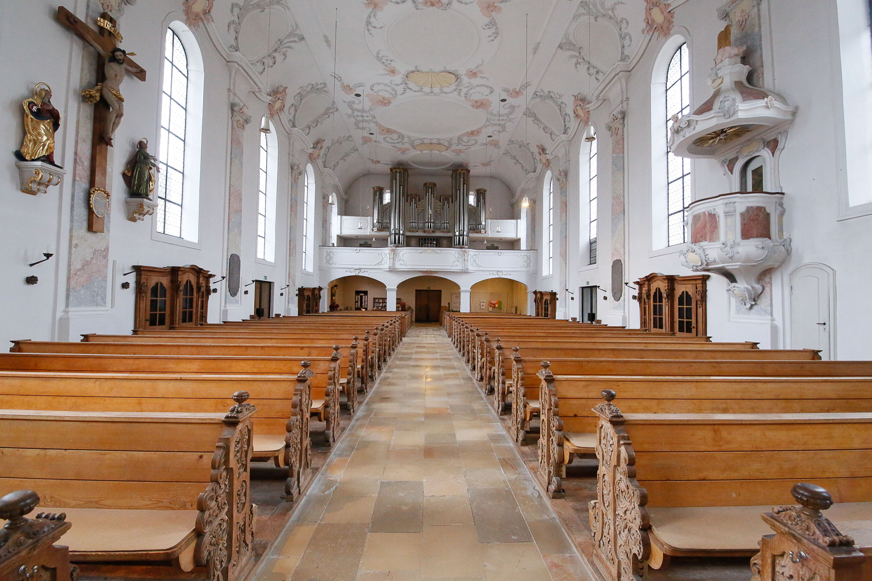 Kirche St. Georg und Michael, Augsburg. Kirchenraum